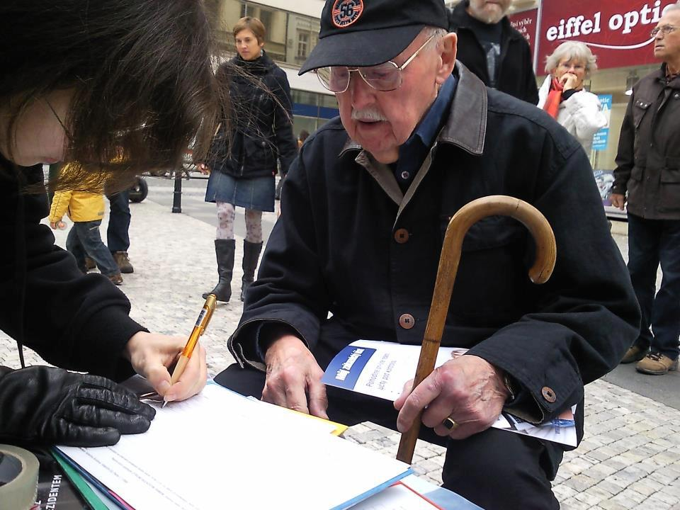 Česky: Lubomír Lipský připojuje podpis pod petici na prezidentskou kandidaturu Vladimíra Franze